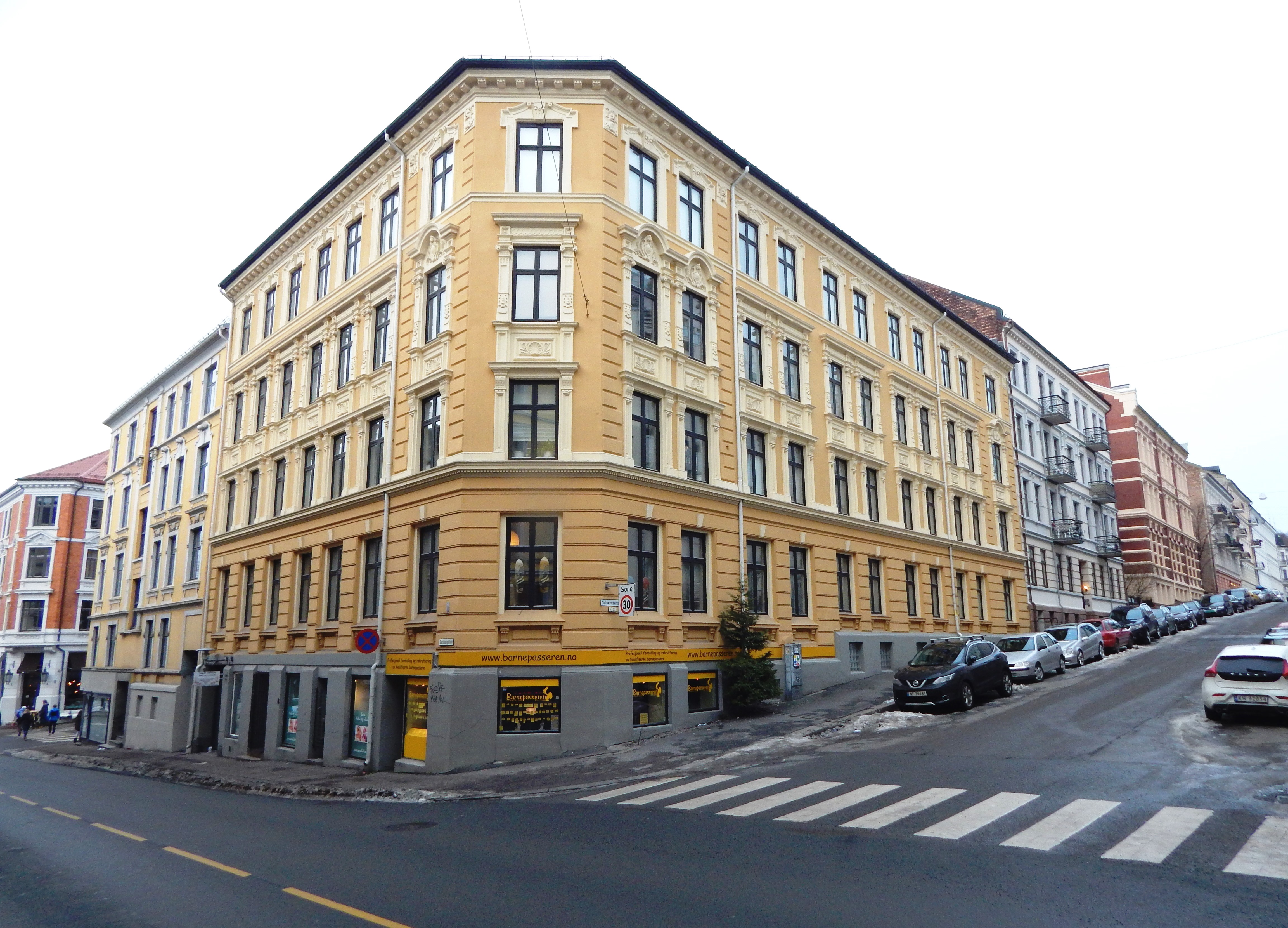 Dalsbergstien 7, hjørnet mot Schwensens gate (t.h.)